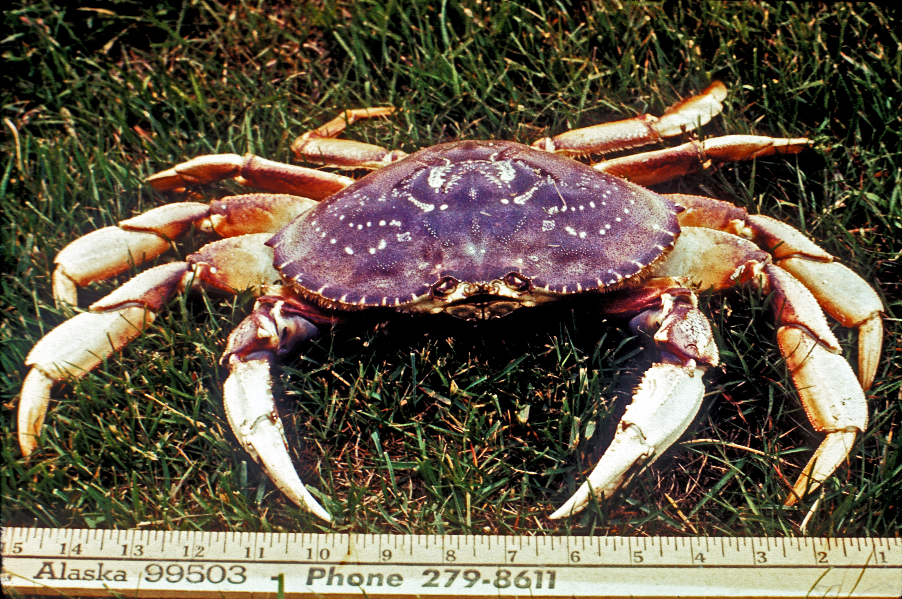 a dungeness crab